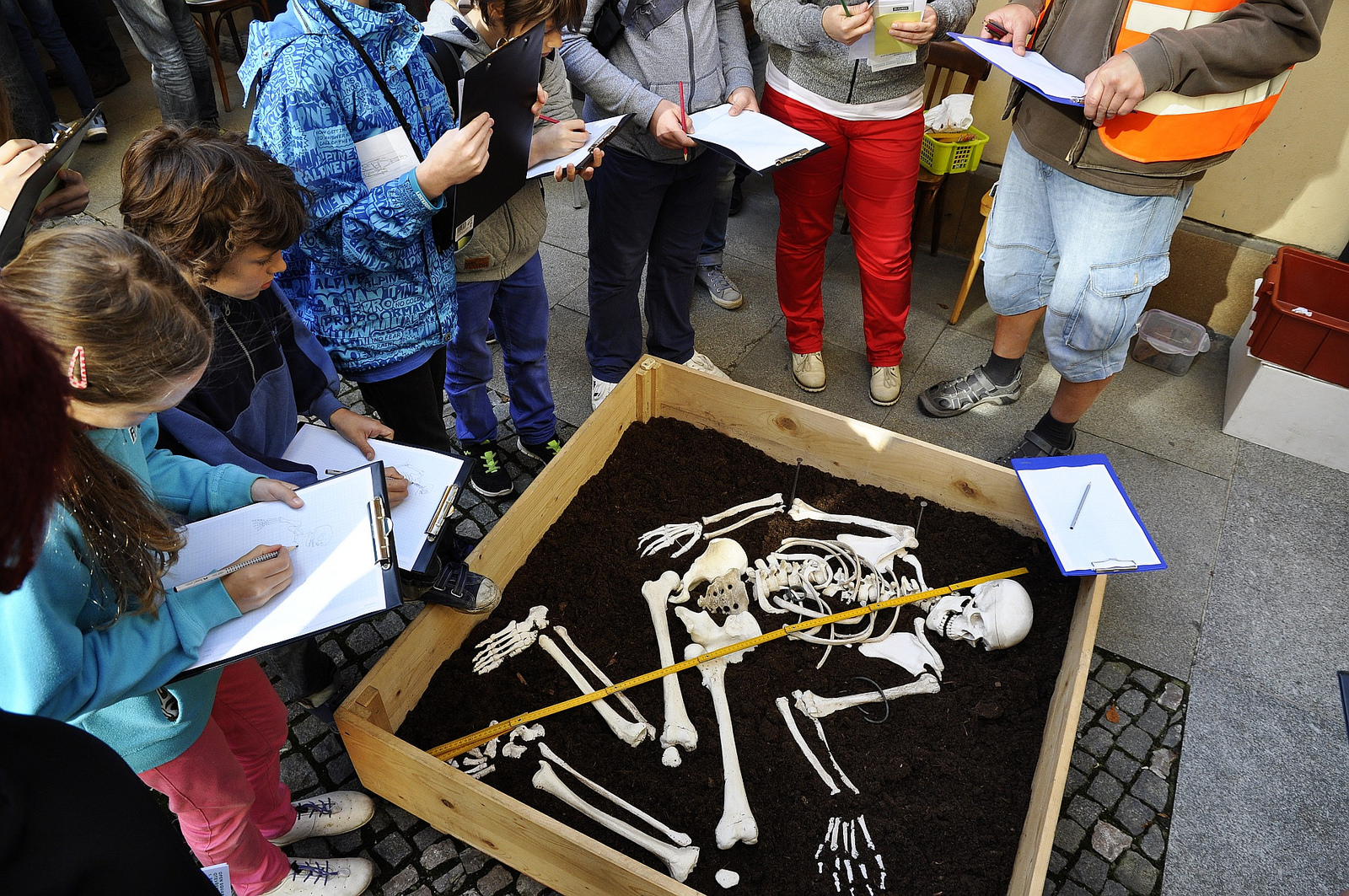 Mezinárodní den archeologie 2014. Děti dokumentují odhalenou kostru prapředka.